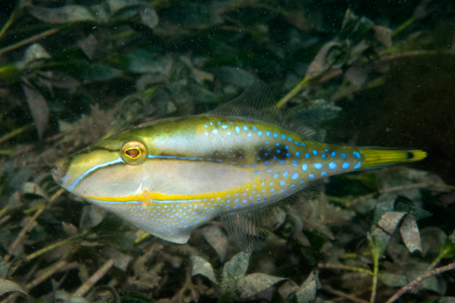 Acanthaluteres spilomelanurus